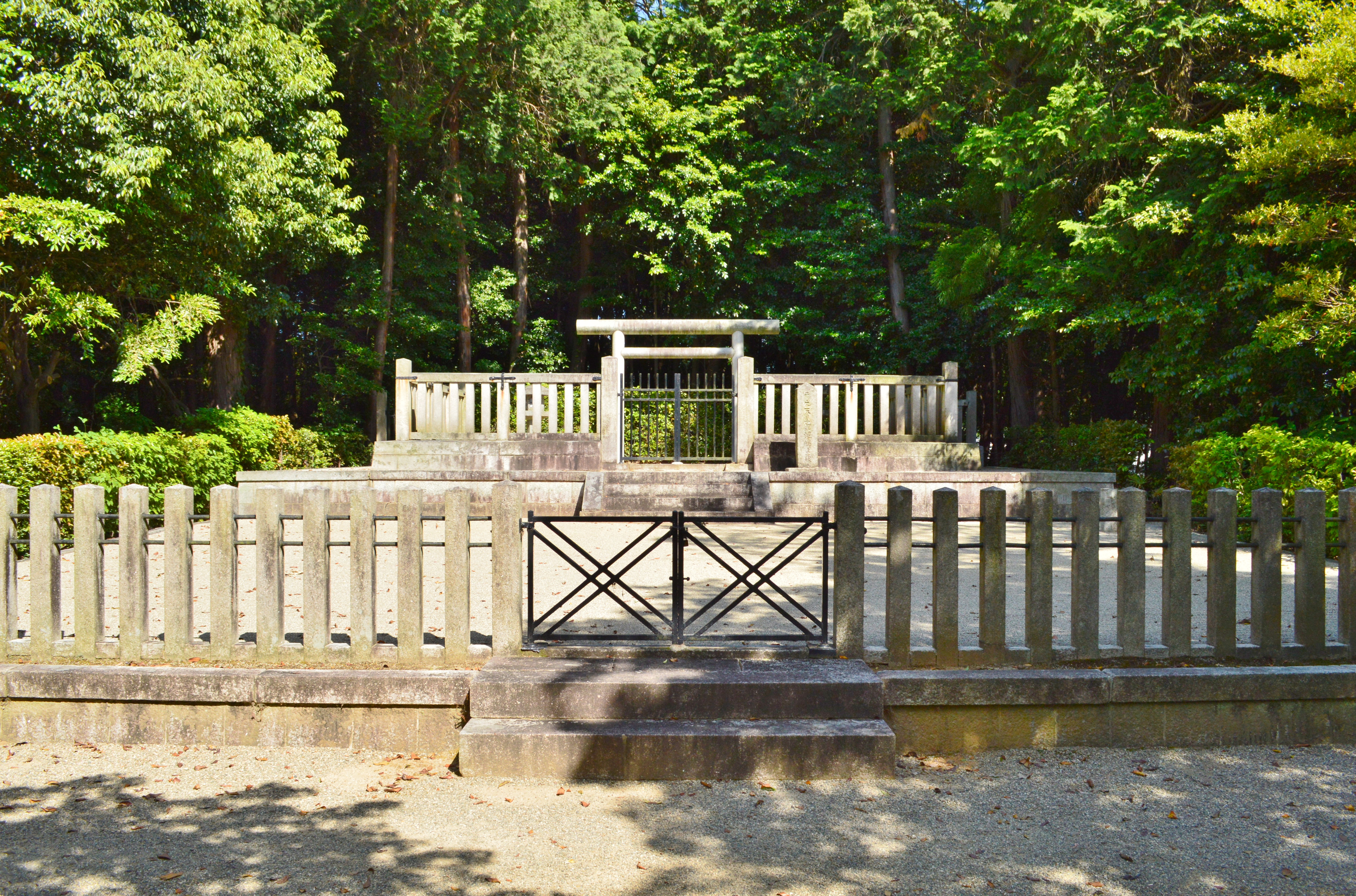 孝元天皇劔池嶋上陵 拝所